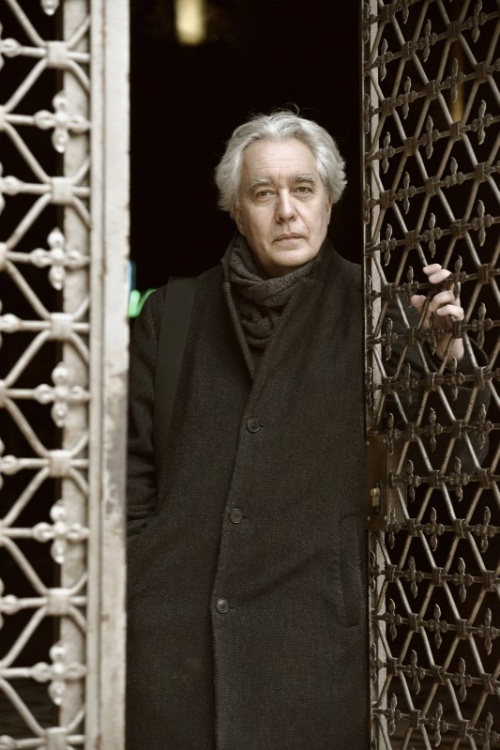 Németh Gábor magyar író, forgatókönyvíró, szerkesztő, egyetemi tanár.